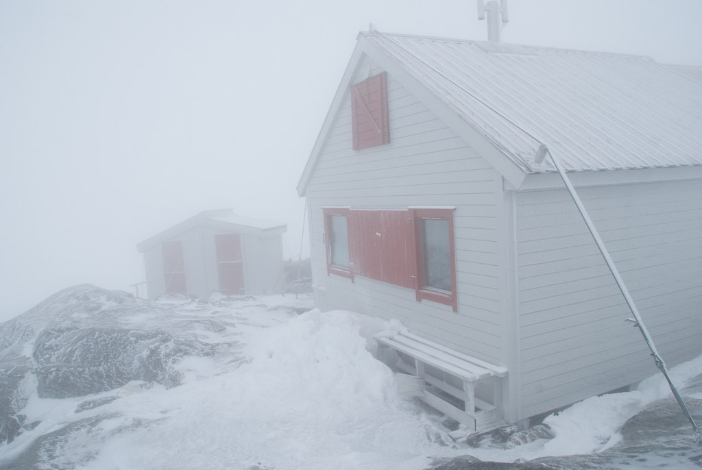 Holmaskjærhytta